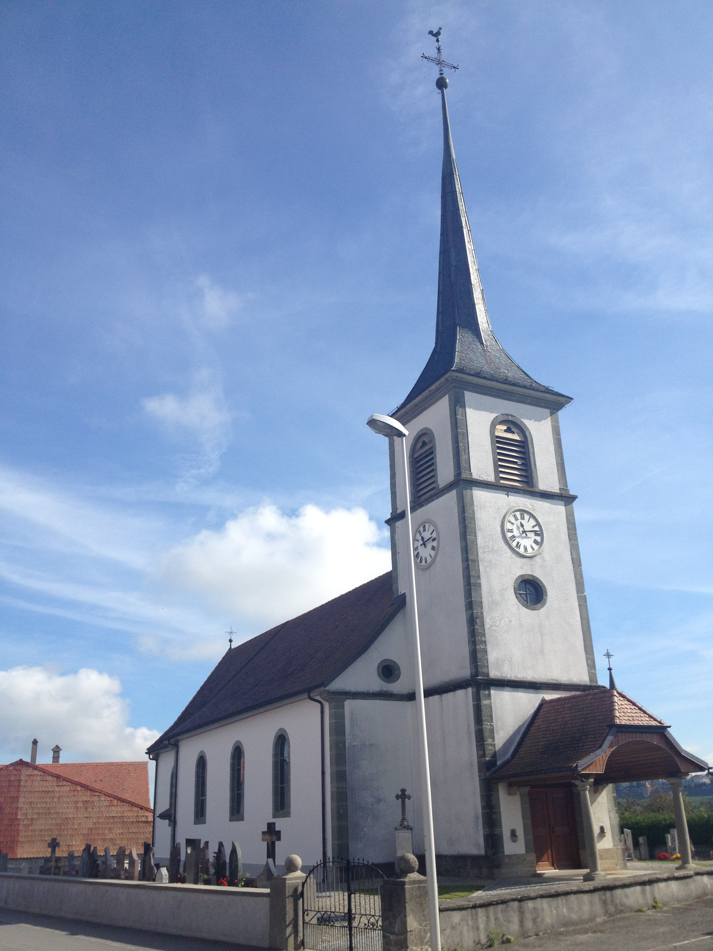 L'église de Billens dans le canton de Fribourg en Suisse.